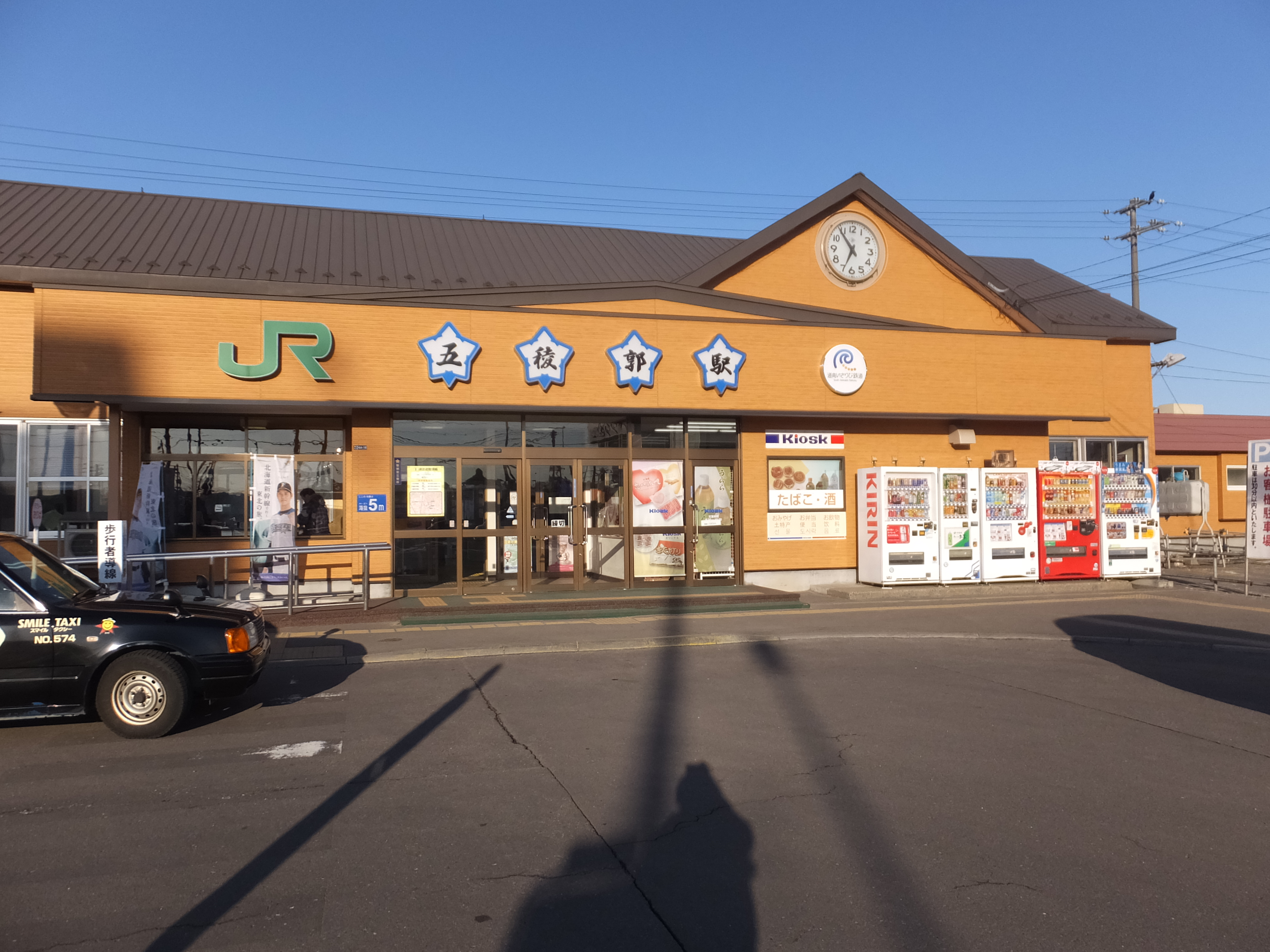 2016.3.26以降のJR北海道、道南いさりび鉄道の五稜郭駅